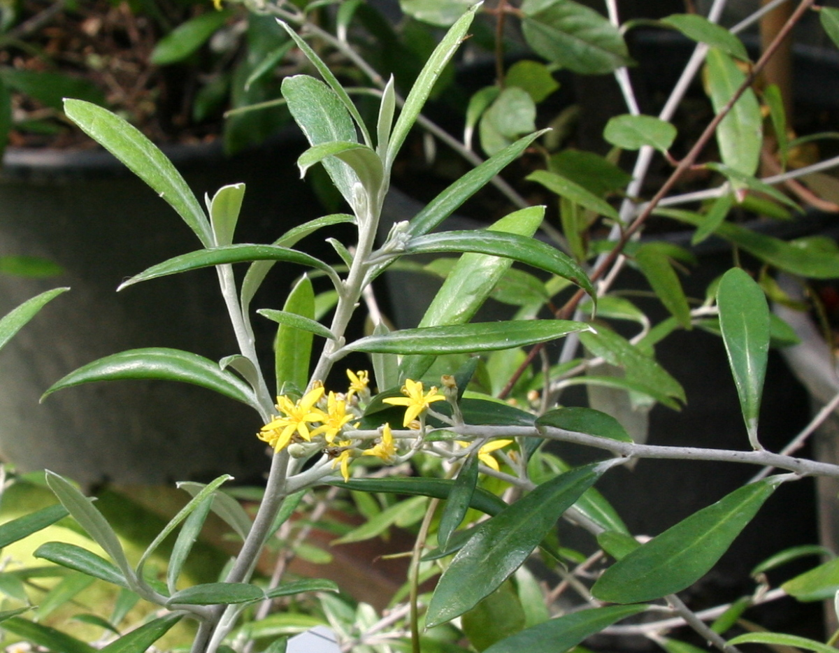 Corokia buddleioides im Botanischen Garten Dresden